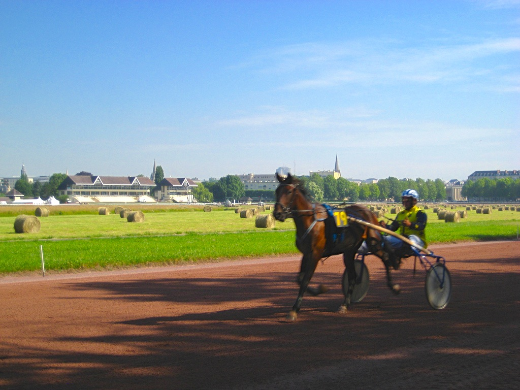 entrainement pour une course de trot attelé sur la piste de l'hippodrome de la Prairie à Caen